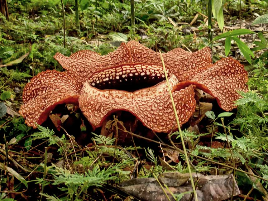 Rafflesia arnoldii 1 metre wide